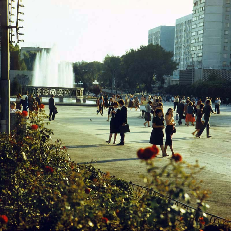 Center Balti - 2 (1985).